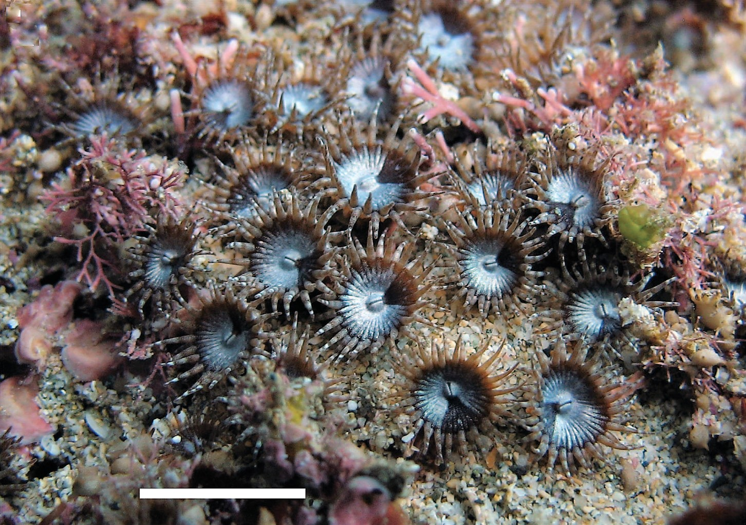 Neozoanthus uchina Colonia en la playa de Tebiro, Amami-oshima, Kagoshima, Japón. 2011.